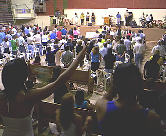 Pueblo Nuevo Baptist Church worship service, Bahia Blanca, Argentina.